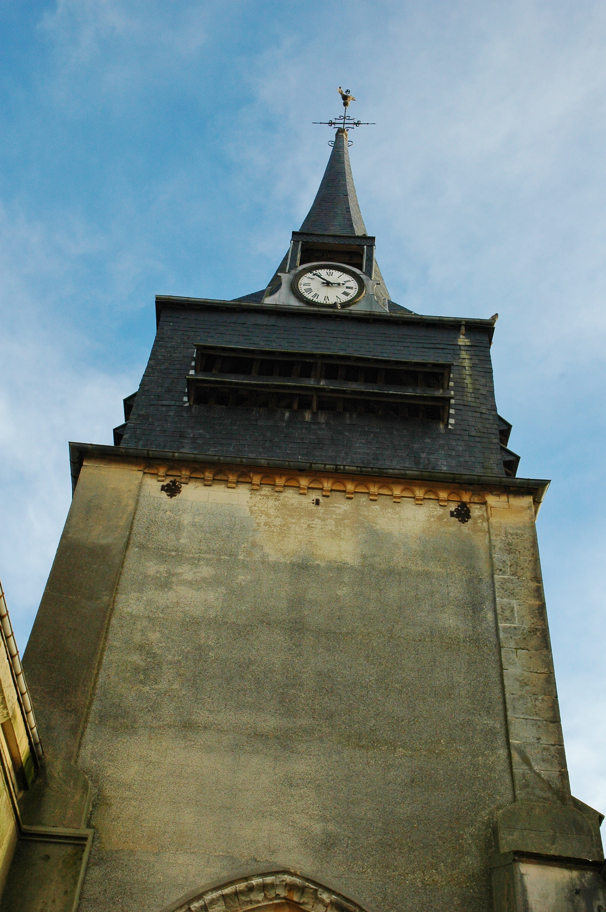 Londinières (Seine-Maritime, France). Le clocher de l'église.